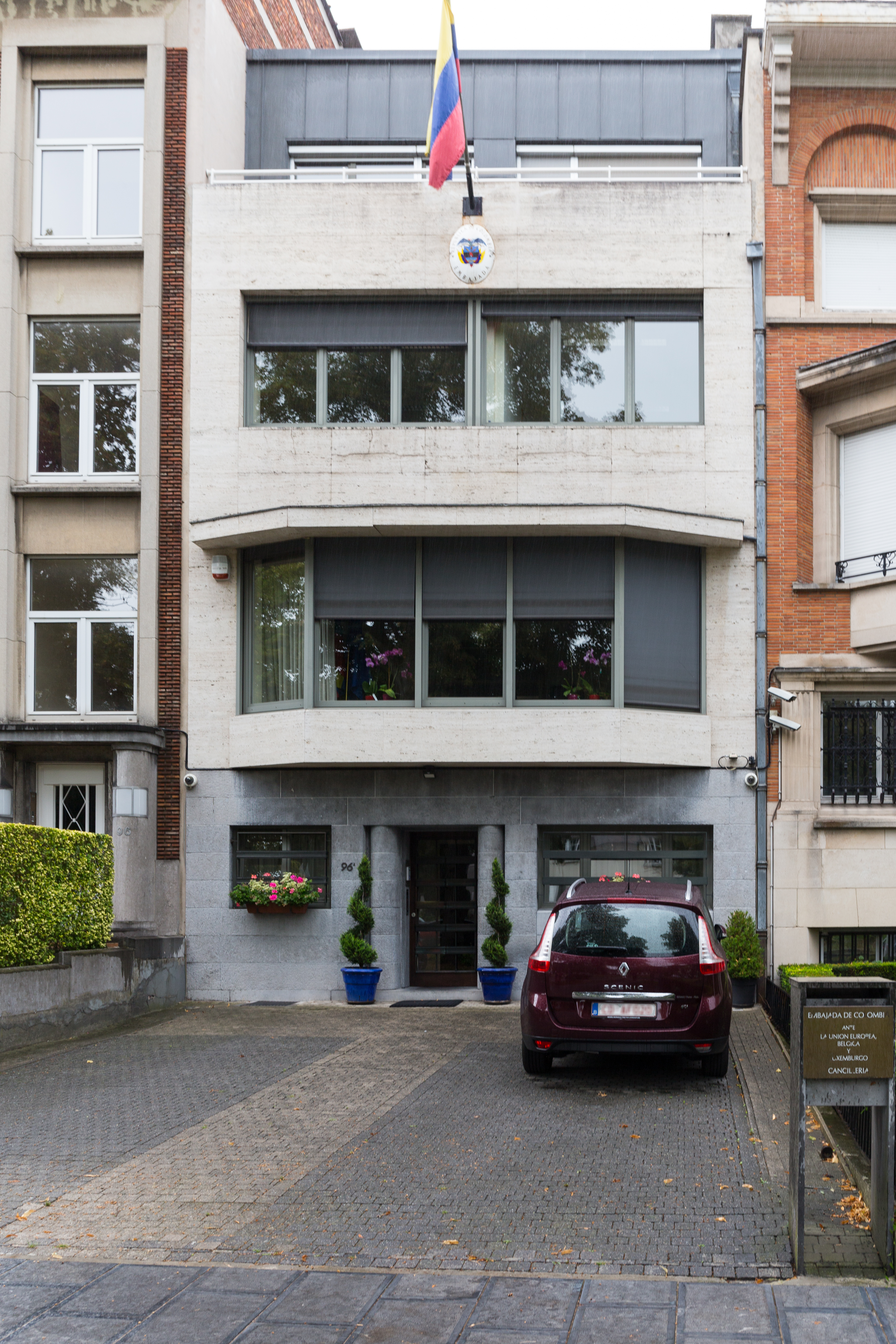 Ambassade de Colombie en Belgique, avenue Franklin Roosevelt 104 à Bruxelles.